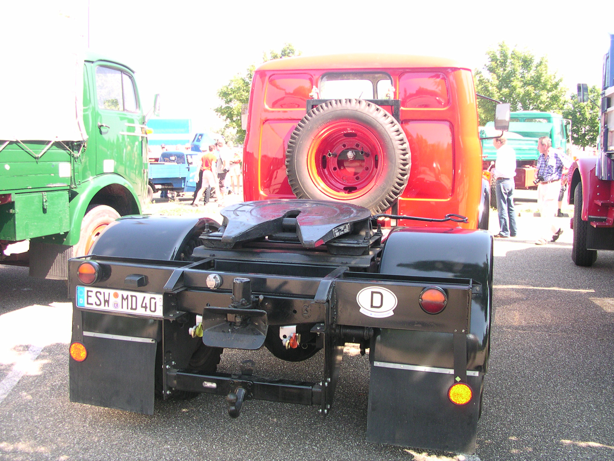 großes Oldtimertreffen im Mercedes-Werk in Wörth am Rhein 2006